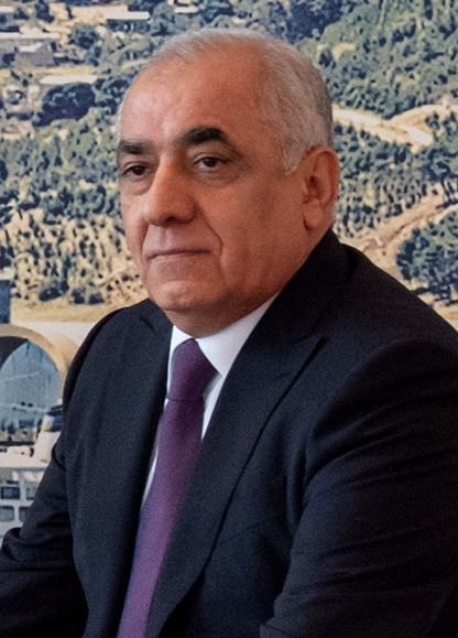 Ali Asadov - Prime Minister of Azerbaijan